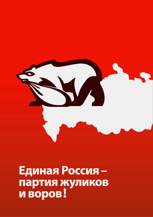 Плакат-победитель в конкурсе Навального "Против партии жуликов и воров"